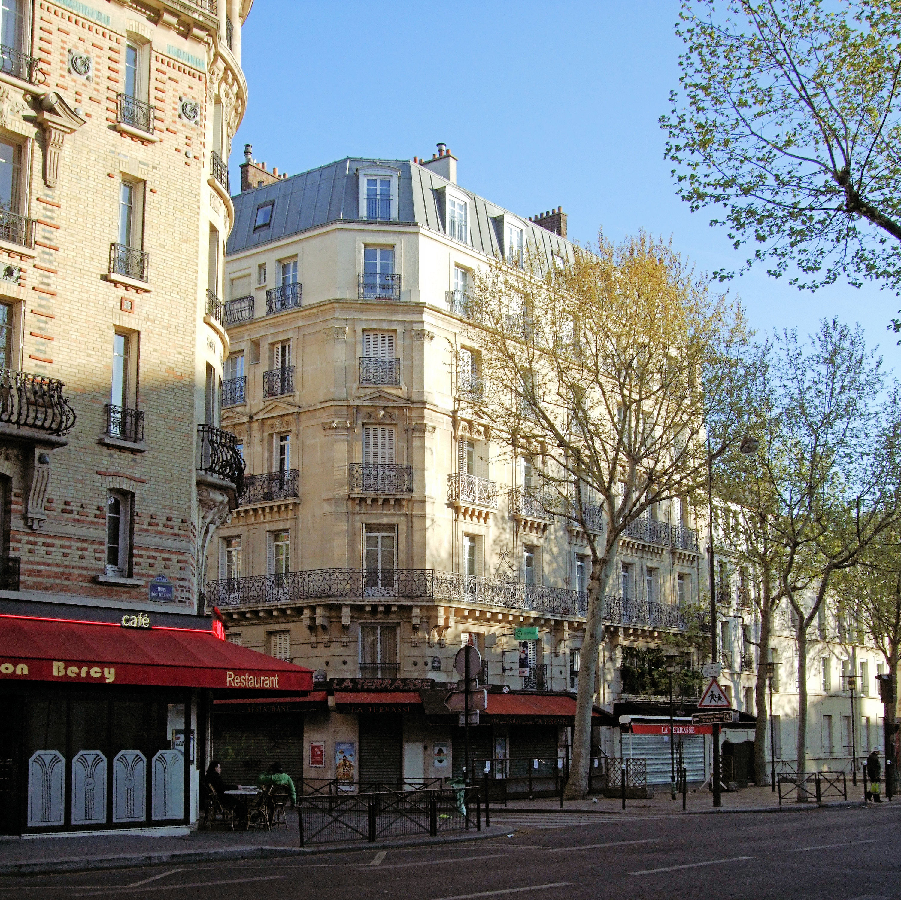 Rue De Dijon, Bercy - Paris.